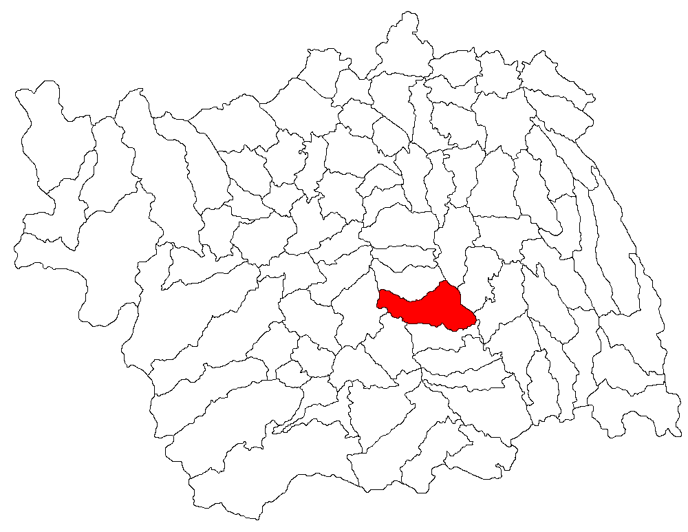 Categorie:Hărţi ale judeţului Bacău